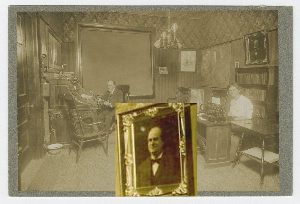 ce document fourni par son fils Robert en 1961 ; le portrait n'est pas celui de l'ancien maire, pas celui du gouverneur du Kansas ou du Président de l'époque donc il se peut que ...